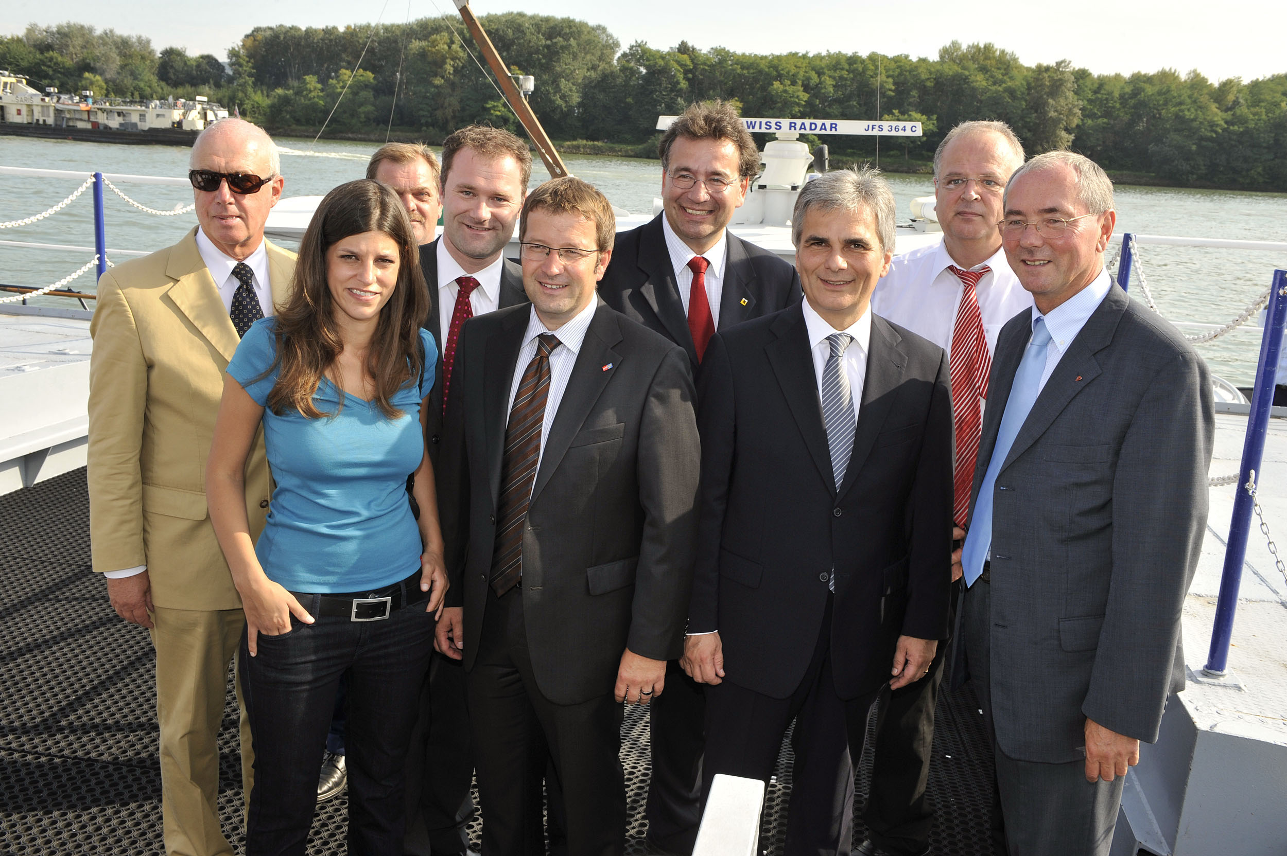 Gemeinsam in Krems: STR Herbert Choholka, Jugendsprecherin Laura Rudas, NÖ LGF Günter Steindl, NR BGM Hannes Fazekas, VBGM Erwin Kirschenhofer, SPÖ-Vorsitzender Werner Faymann, STR Reinhard Resch und Labg. Ewald Sacher. Foto: Johannes Zinner